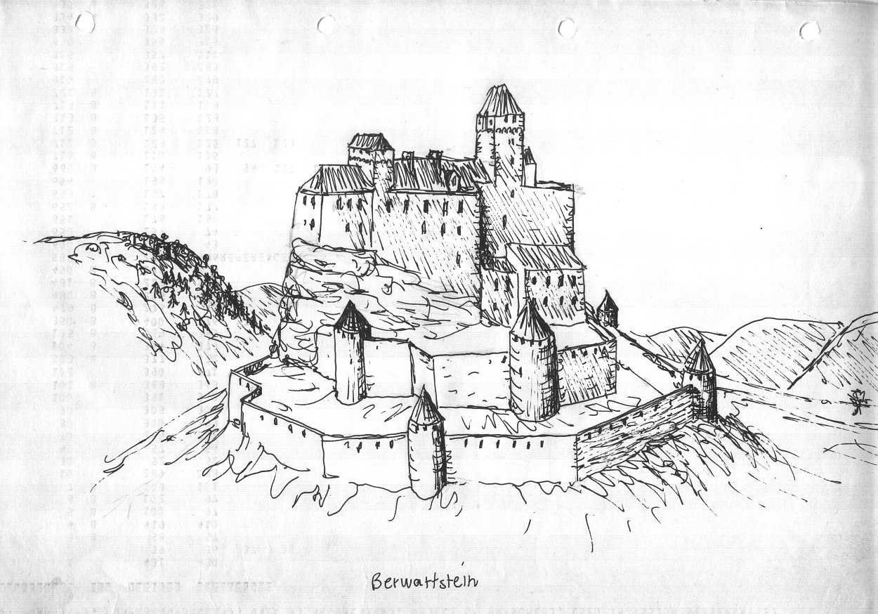 Burg Berwartstein, Rekonstruktionsversuch